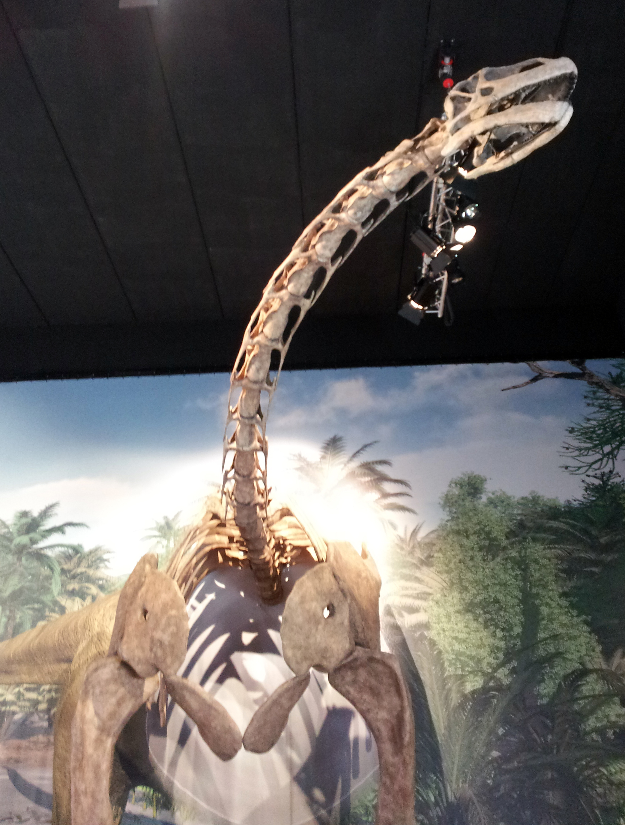 Turiasaurus Riodevensis